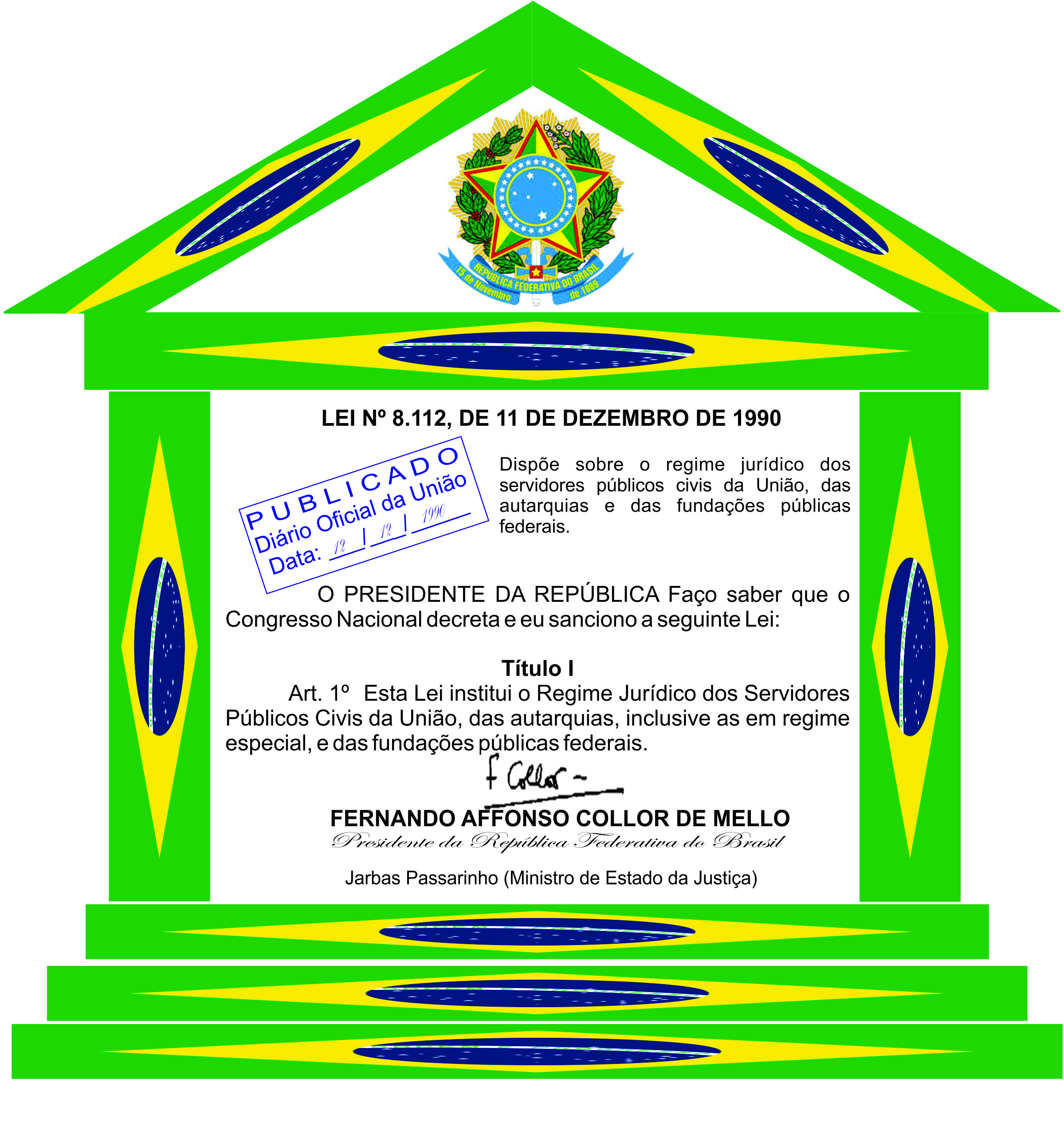 Pórtico com a parte inicial com a Lei 8112